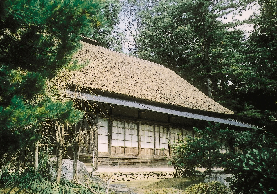 The Miki Family Residence in Mima-shi, Tokushima-ken, Japan